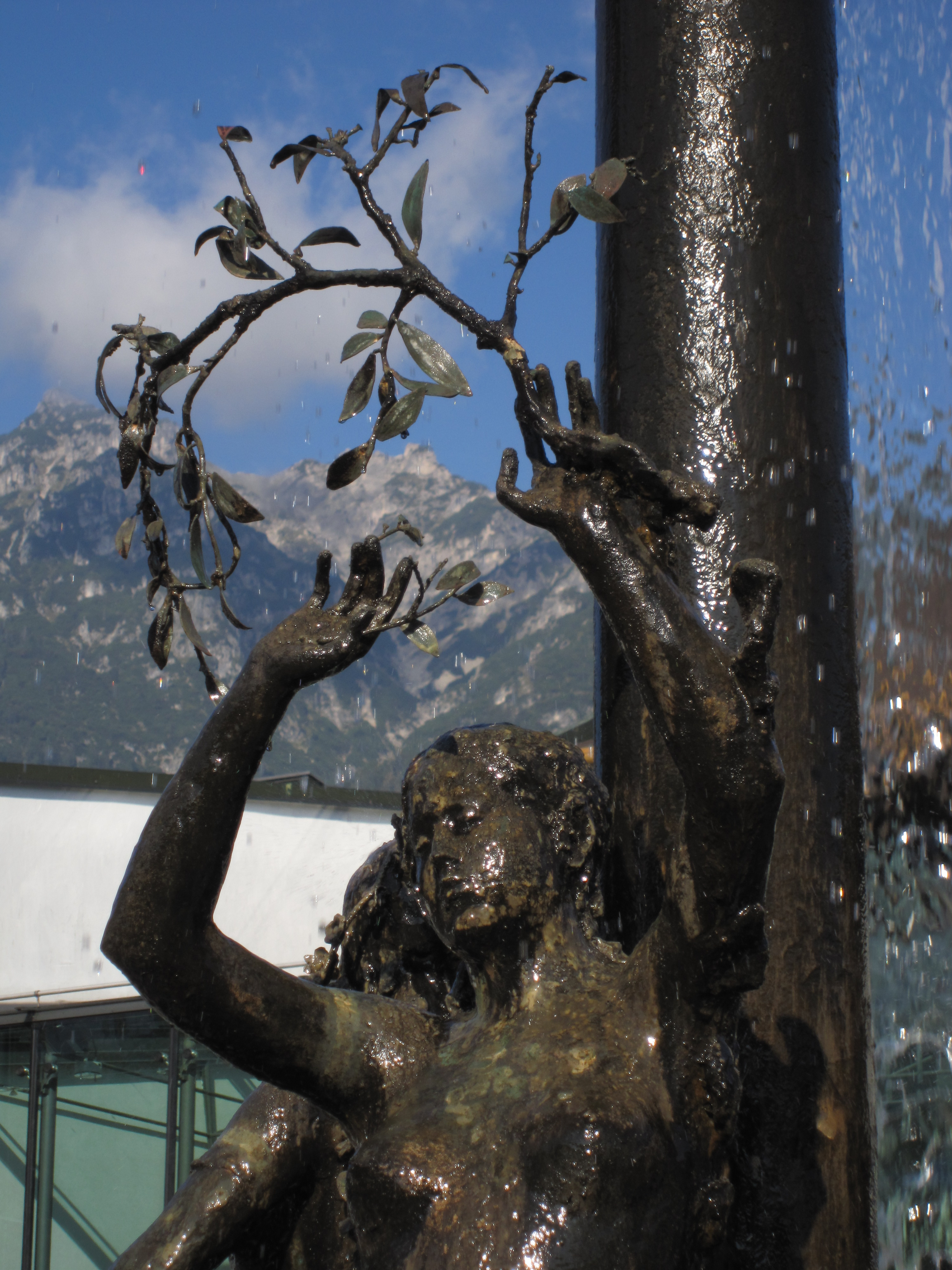 Richard-Strauss-Brunnen in Garmisch.